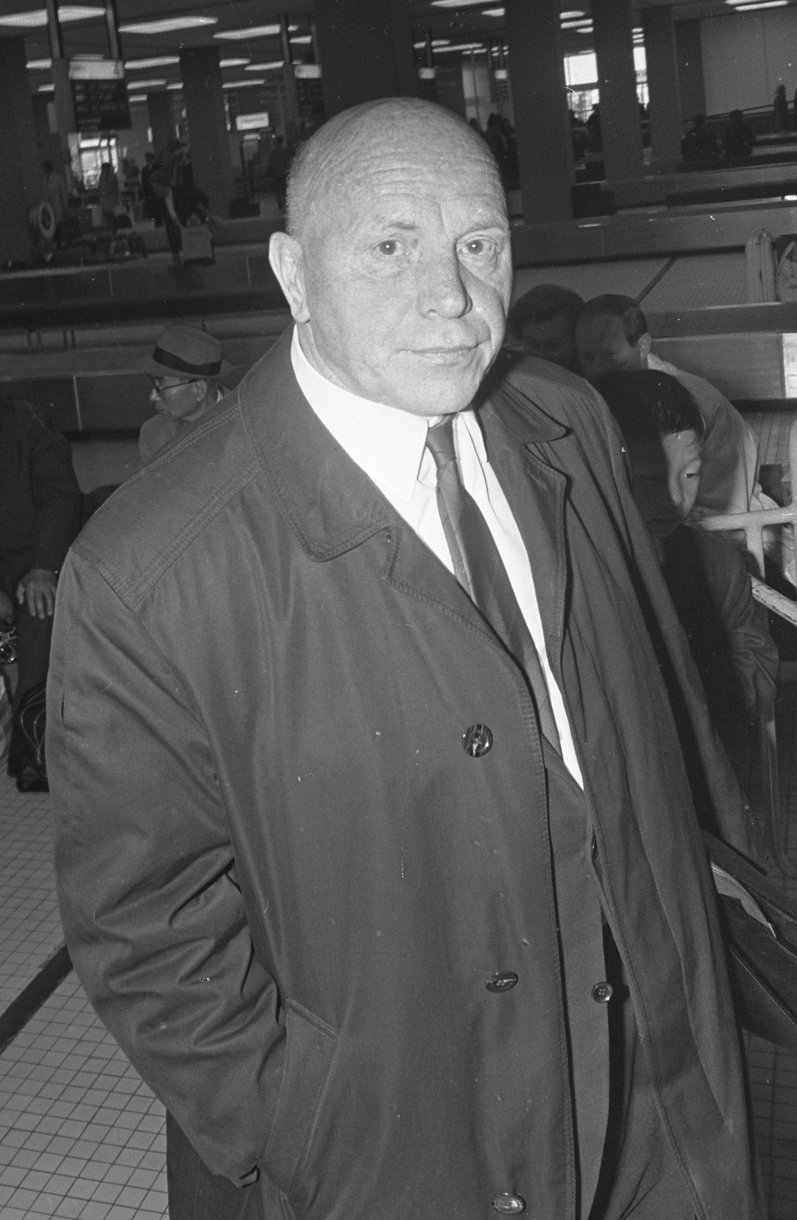 Collectie / Archief : Fotocollectie Anefo Reportage / Serie : [ onbekend ] Beschrijving : Aankomst HSV Hamburg op Schiphol. Trainer Georg Knöpfle van HSV Hamburg Annotatie : HSV zou op 23 mei 1968 in Rotterdam de Europacup II finale spelen tegen Inter Milan Datum : 20 mei 1968 Locatie : Schiphol Trefwoorden : trainers, vliegvelden Persoonsnaam : Knöpfle, Georg Fotograaf : Nijs, Jac. de / Anefo, [onbekend] Auteursrechthebbende : Nationaal Archief Materiaalsoort : Negatief (zwart/wit) Nummer archiefinventaris : bekijk toegang 2.24.01.05 Bestanddeelnummer : 921-3679